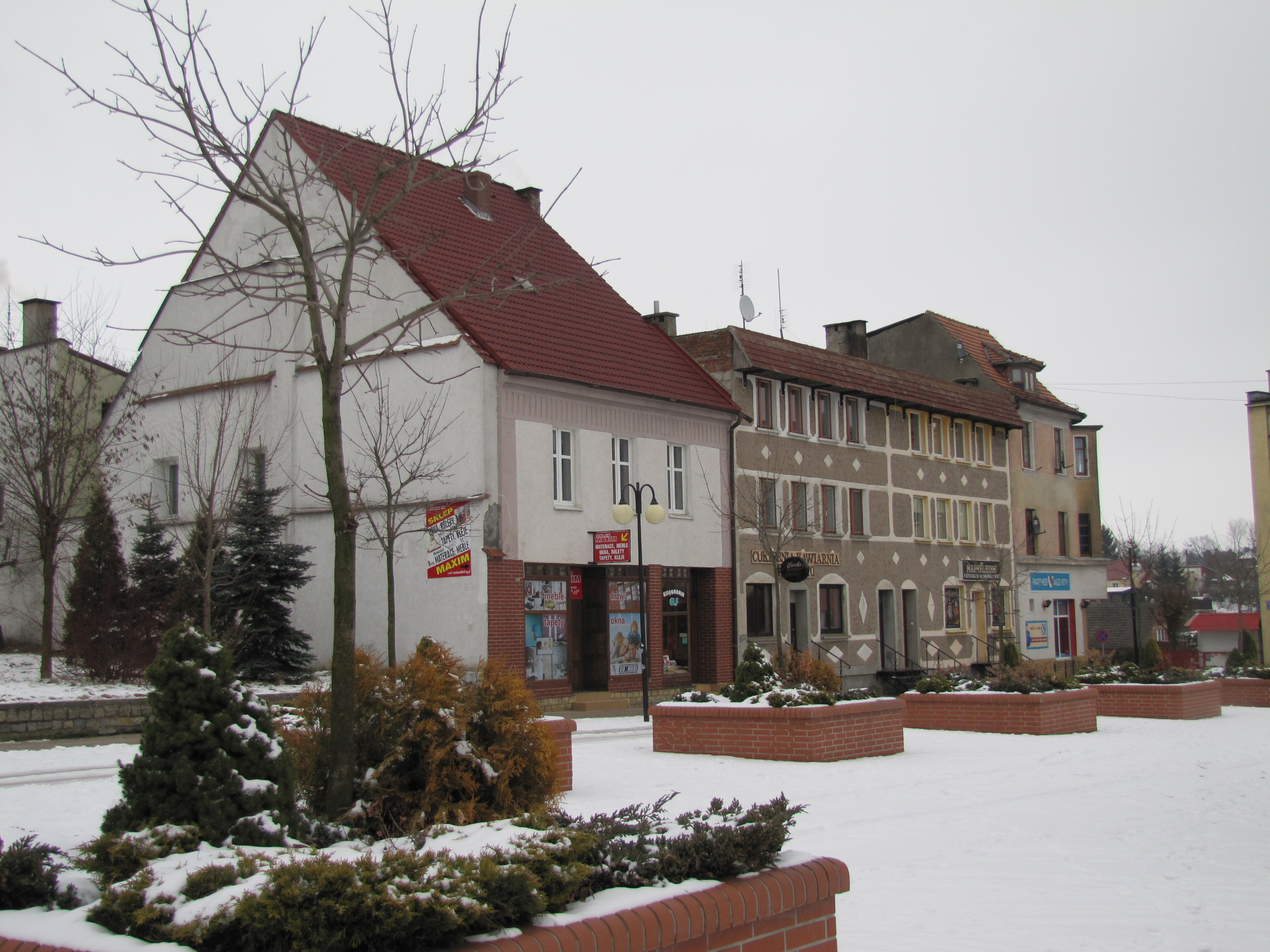 Obiekty Usługowo-Handlowe.